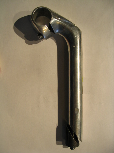 Bicycle stem